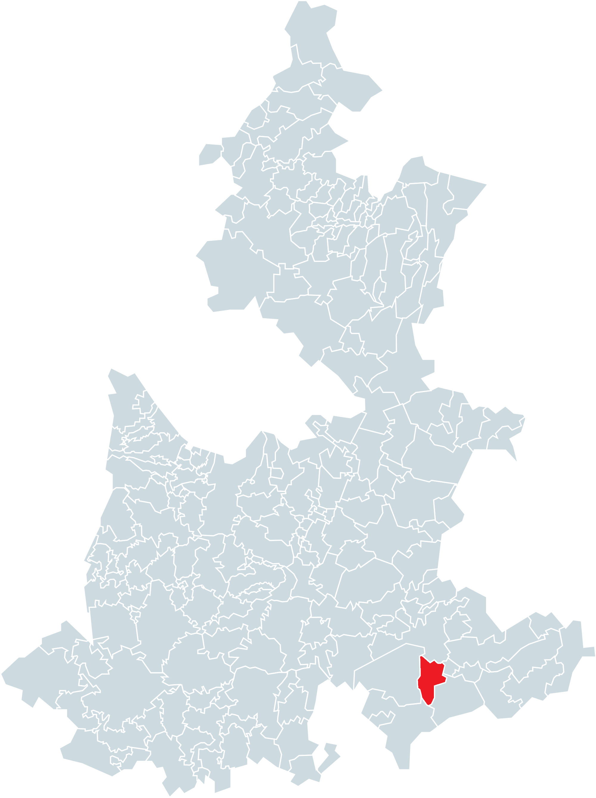 Municipio de San Gabriel Chilac